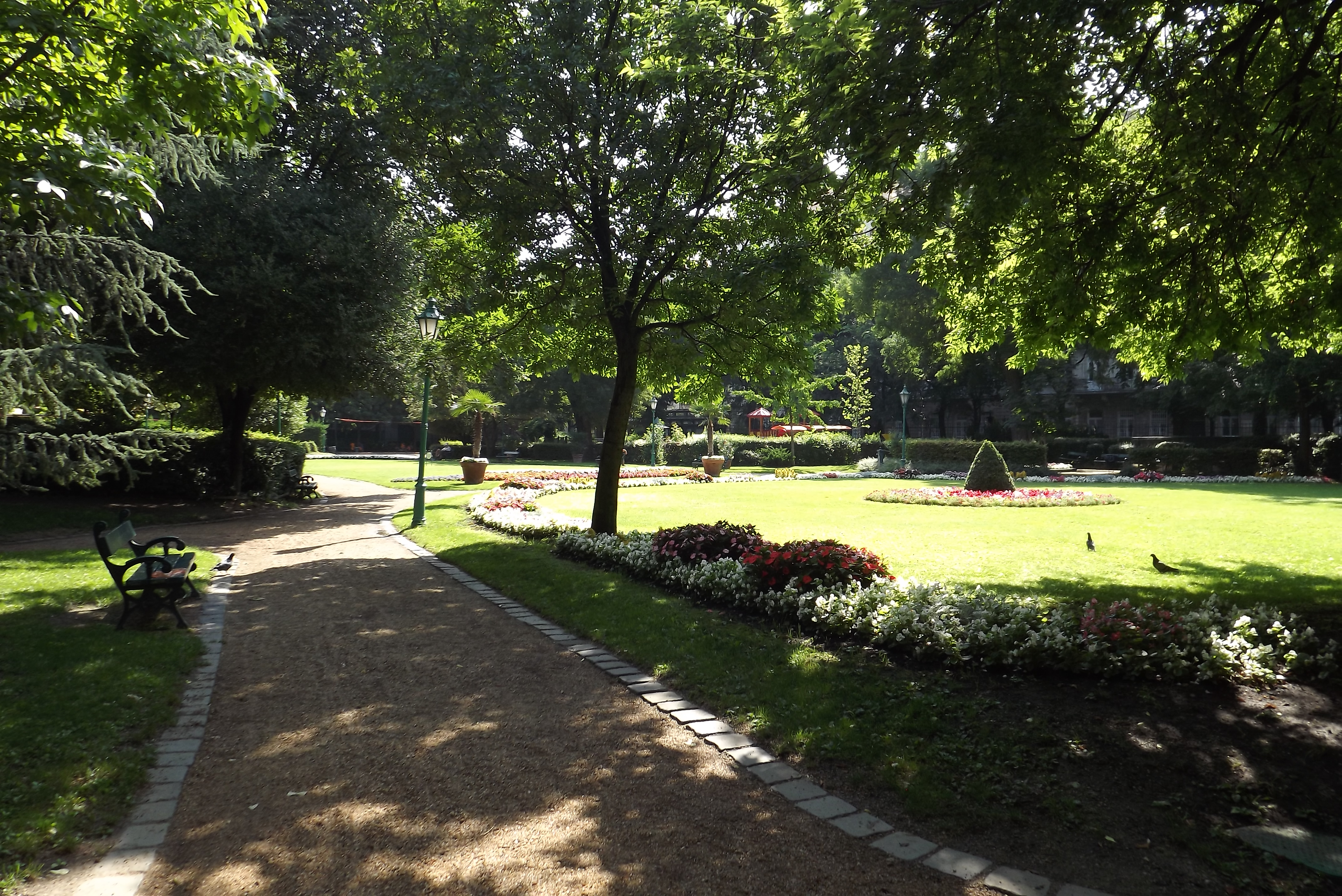 A budapesti Károlyi-kert 2014 augusztusában (Budapest, V. ker.)